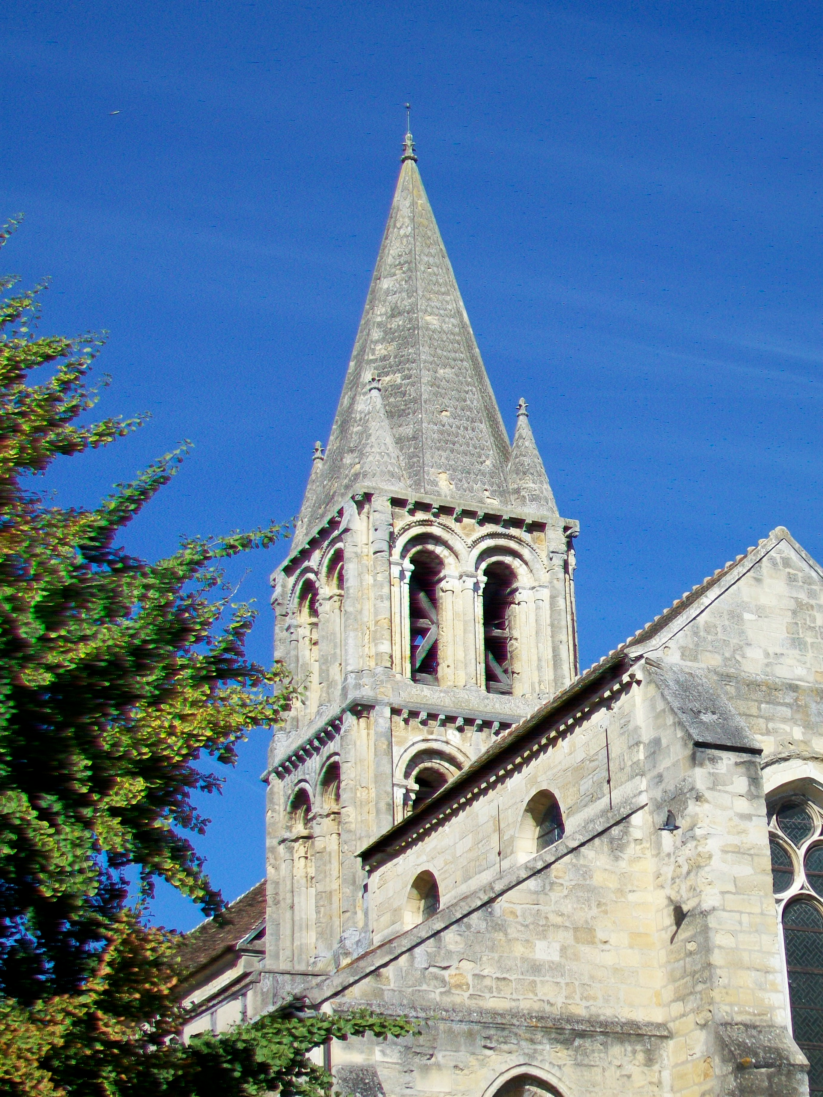 Le clocher, côté est.